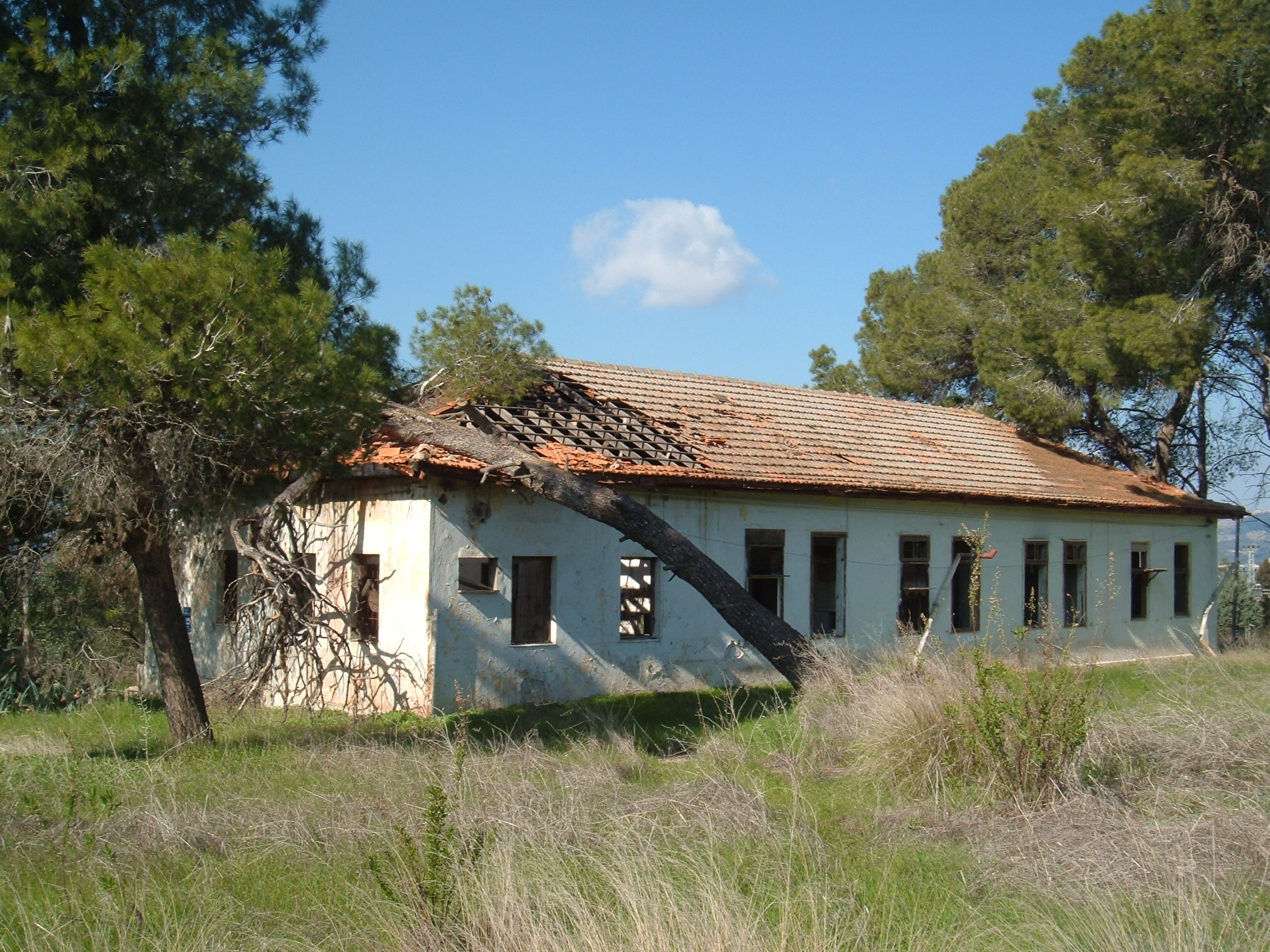 The children's living quarters in "Kfar Yeladim", Afula, Israel. בית ששימש בעבר למגורי הילדים בכפר הילדים בעפולה